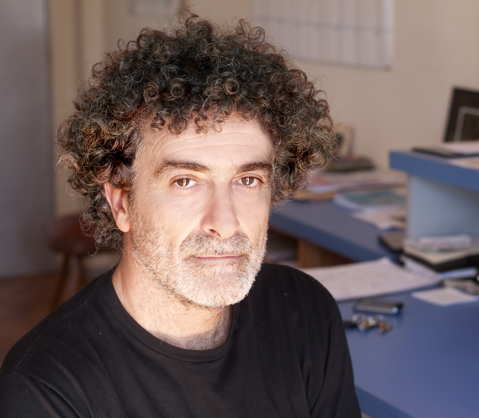 Guionista, productor y director cinematográfico